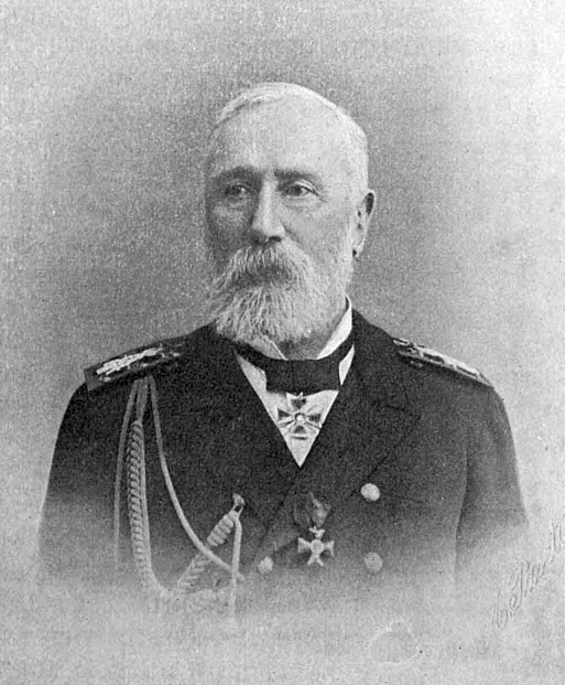 Чихачов Николай Матвеевич